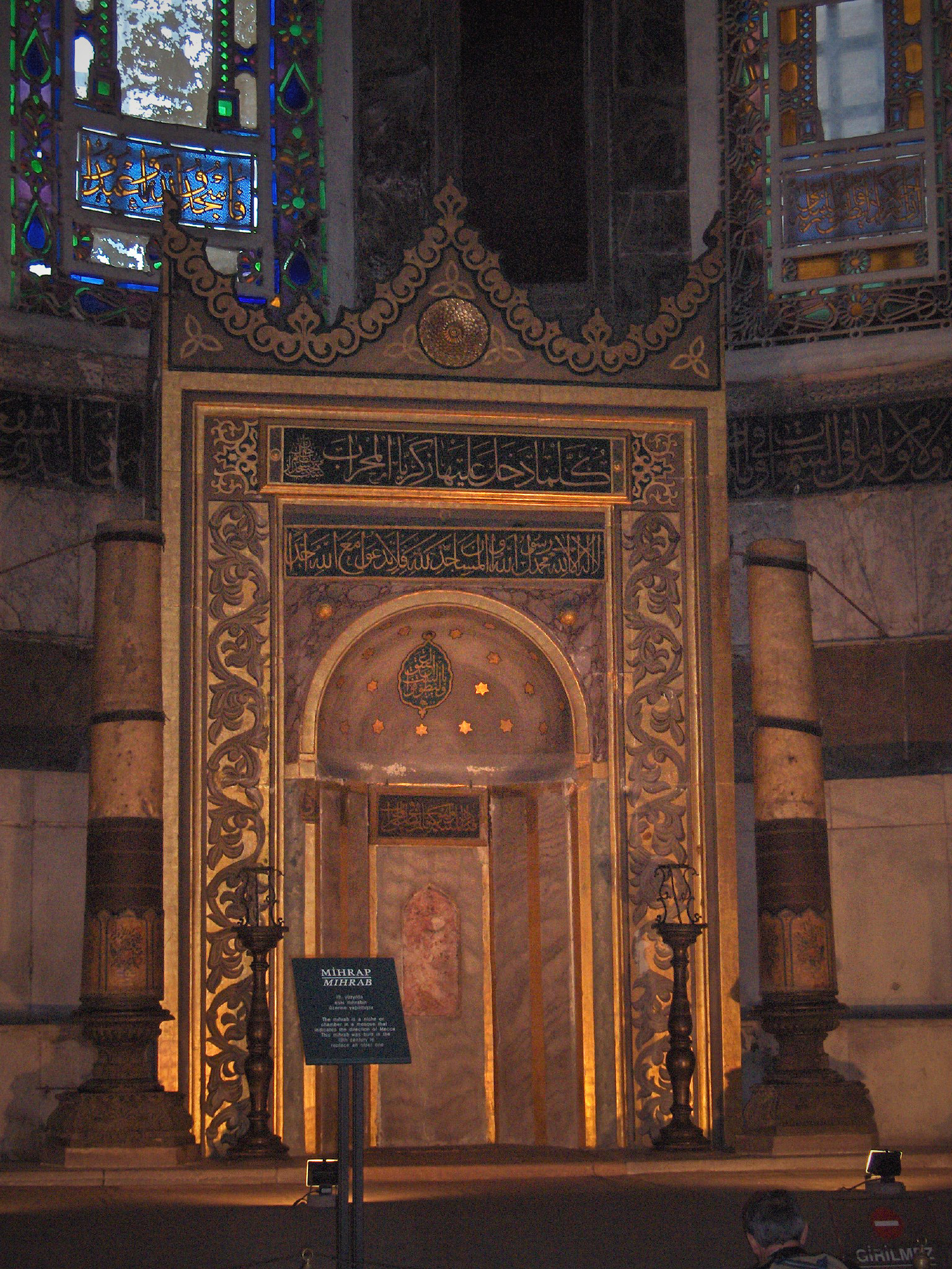 Hagia Sophia ; inside view : mihrab; Istanbul, Turkey